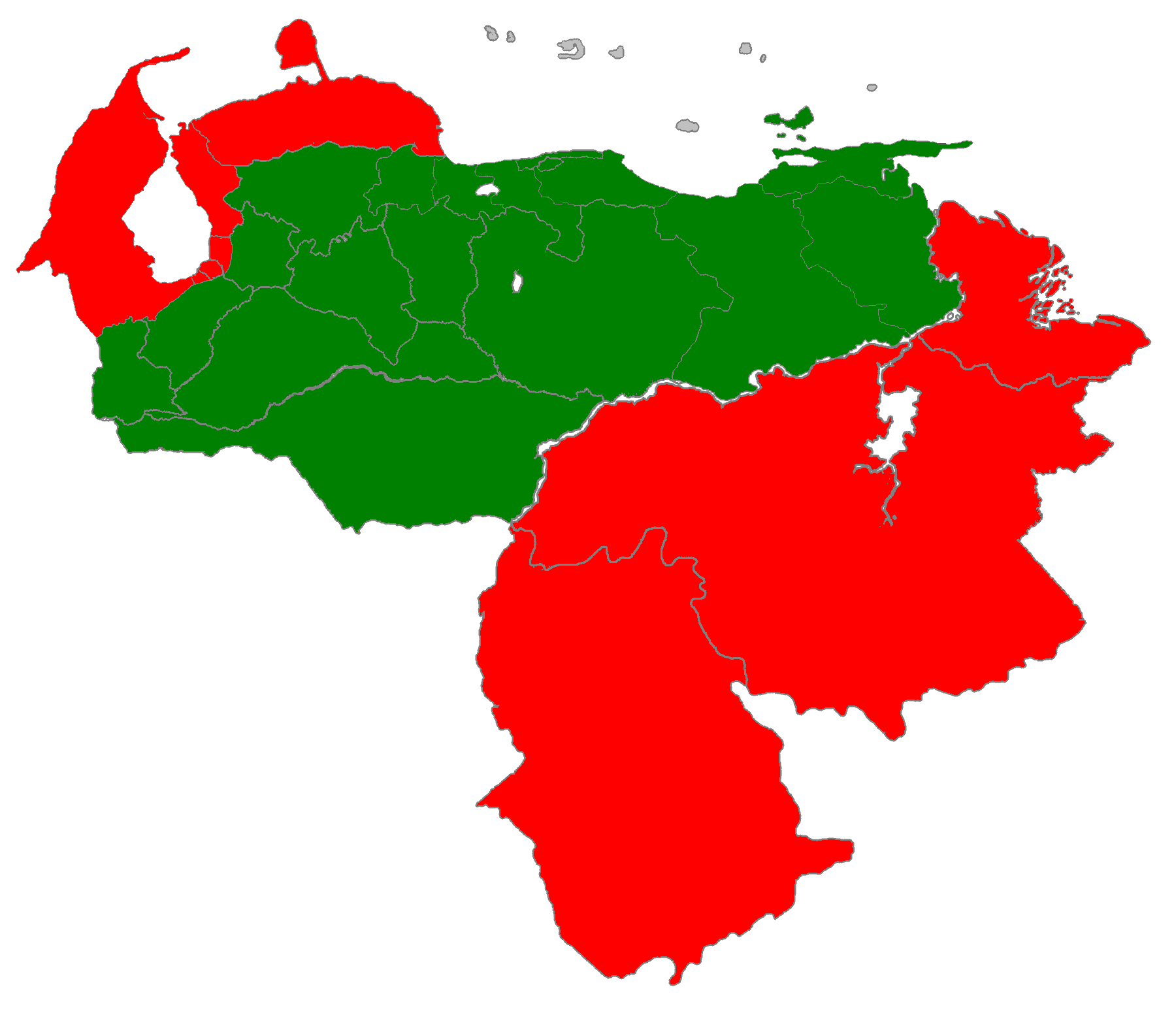 Territorio de la Segunda República de Venezuela